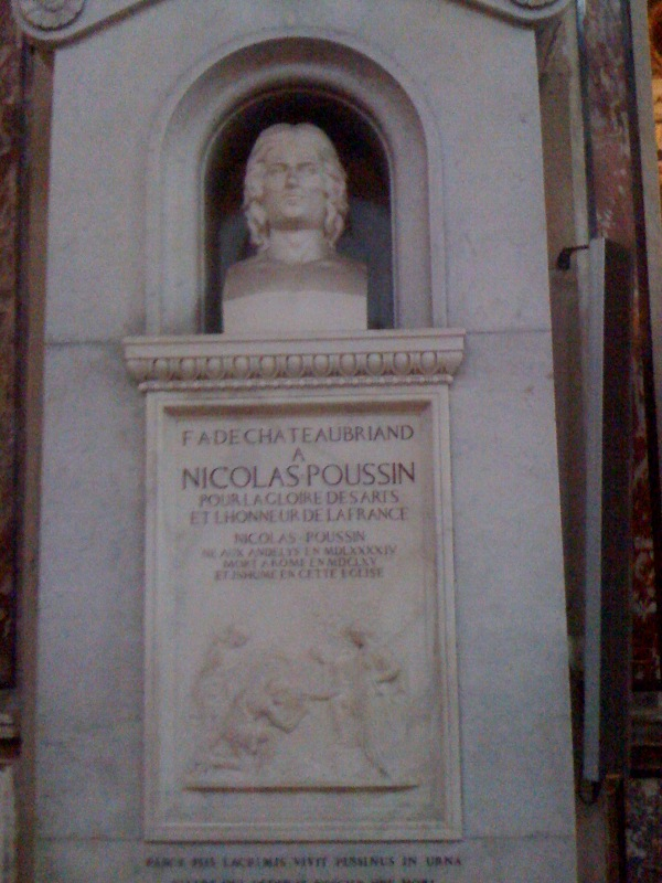 Plaque Commémorative de la Tombe de Nicolas Poussin à San Lorenzo in Lucina à Rome